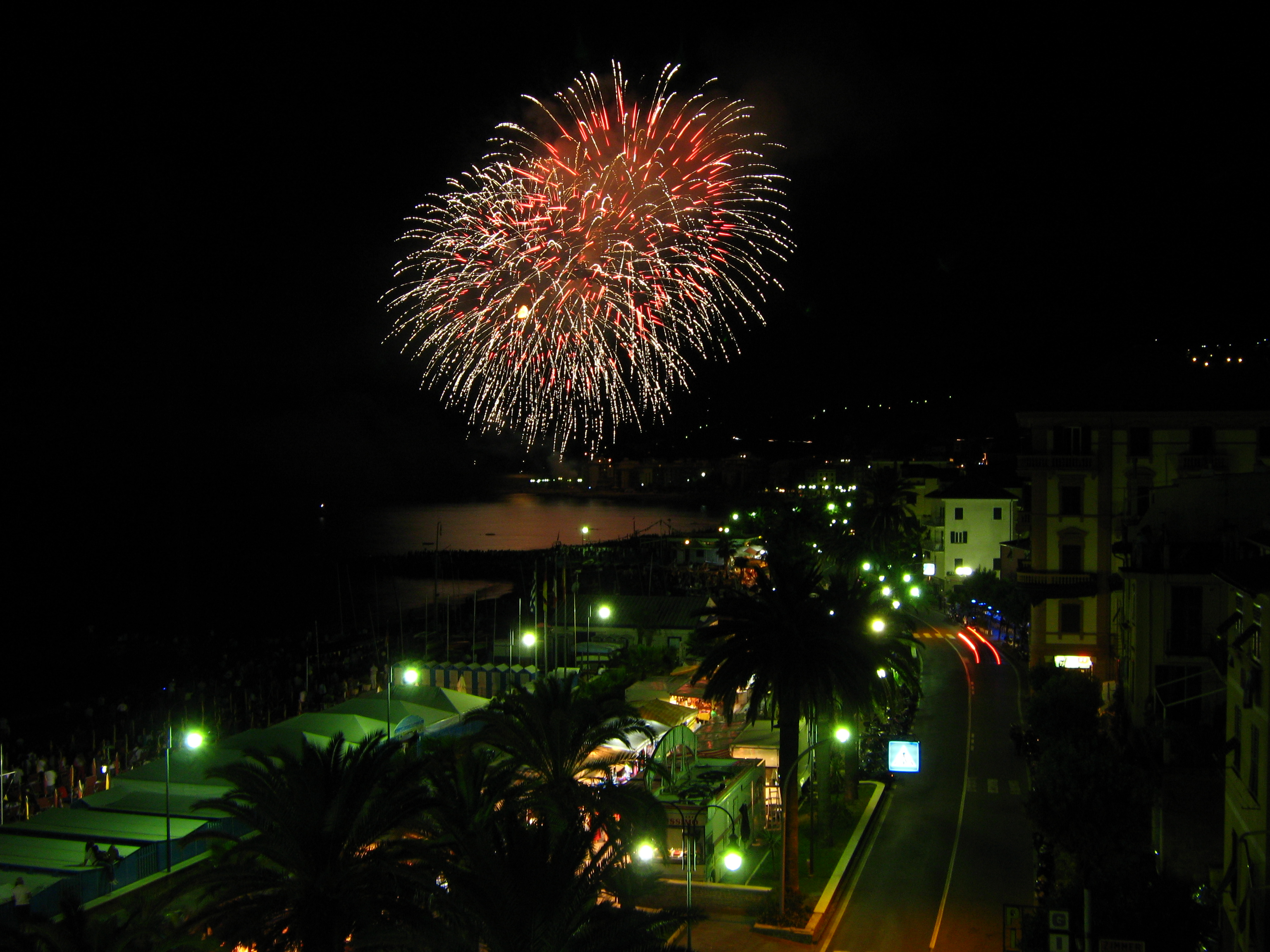 Spettacolo pirotecnico a Cogoleto (Genova) in occasione della festa patronale di San Lorenzo martire